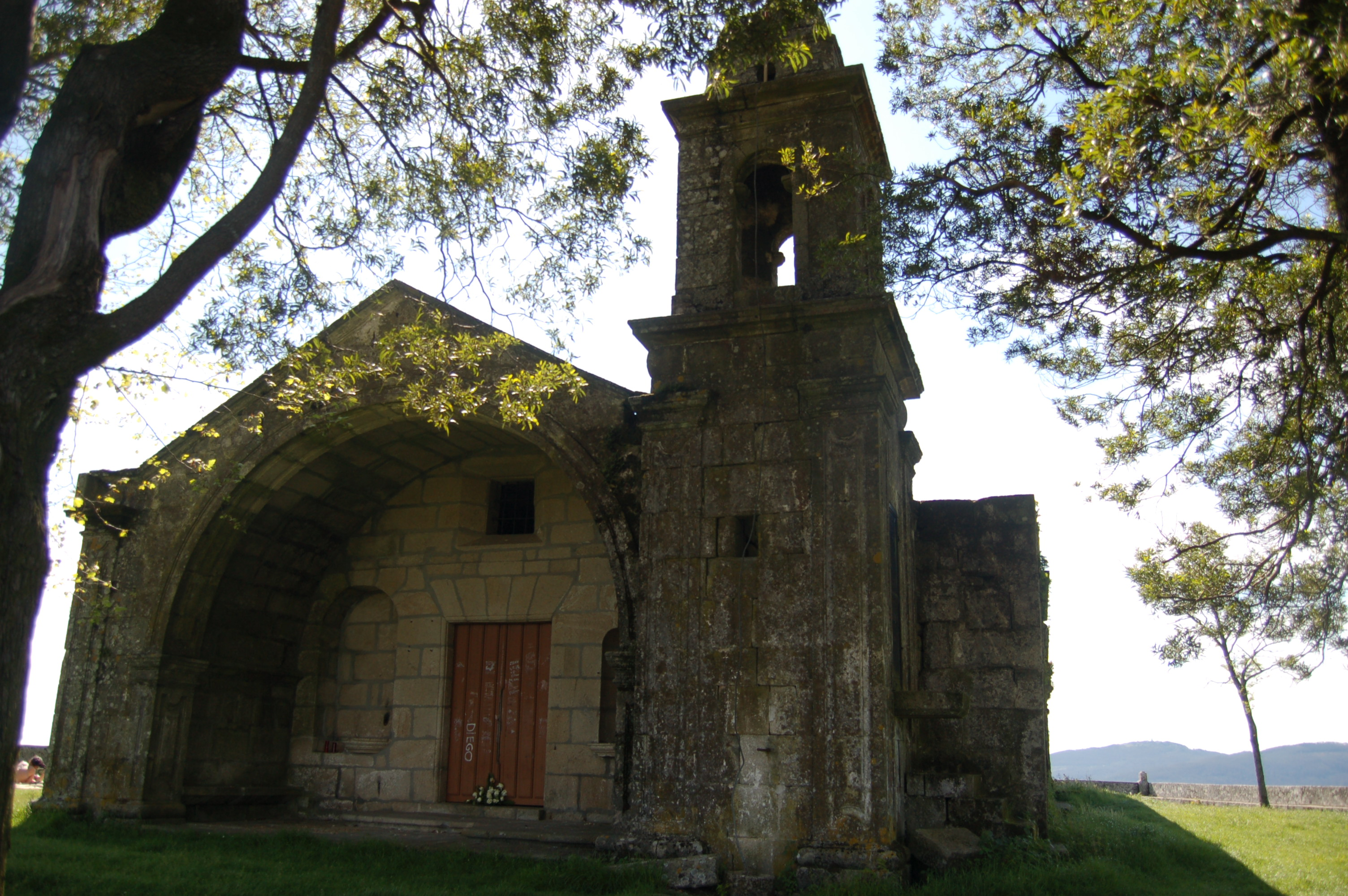 Capela da Virxe das Neves no Monte da Peneda (O Viso, Redondela)